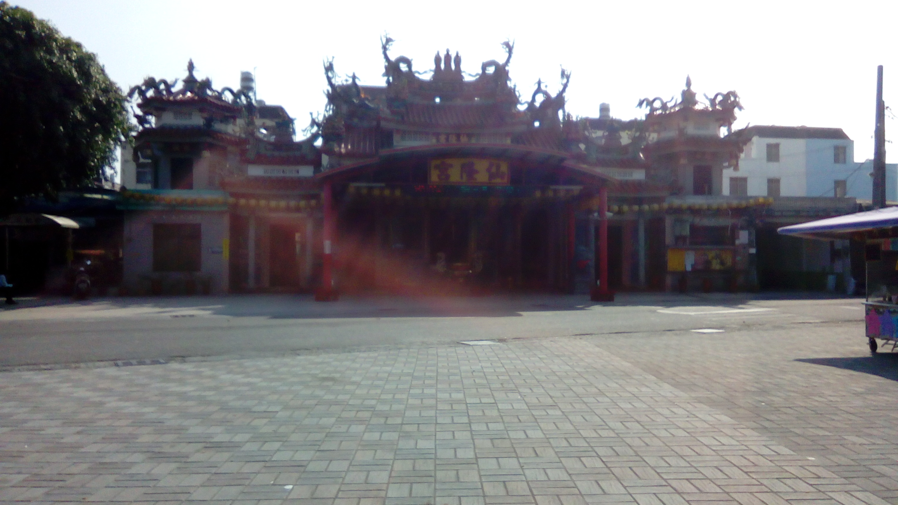 位於新園市區 仙隆路上 臨仙吉國小及新園國中